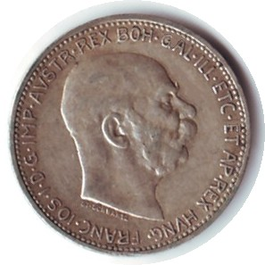 Austria 1913 1 Krone